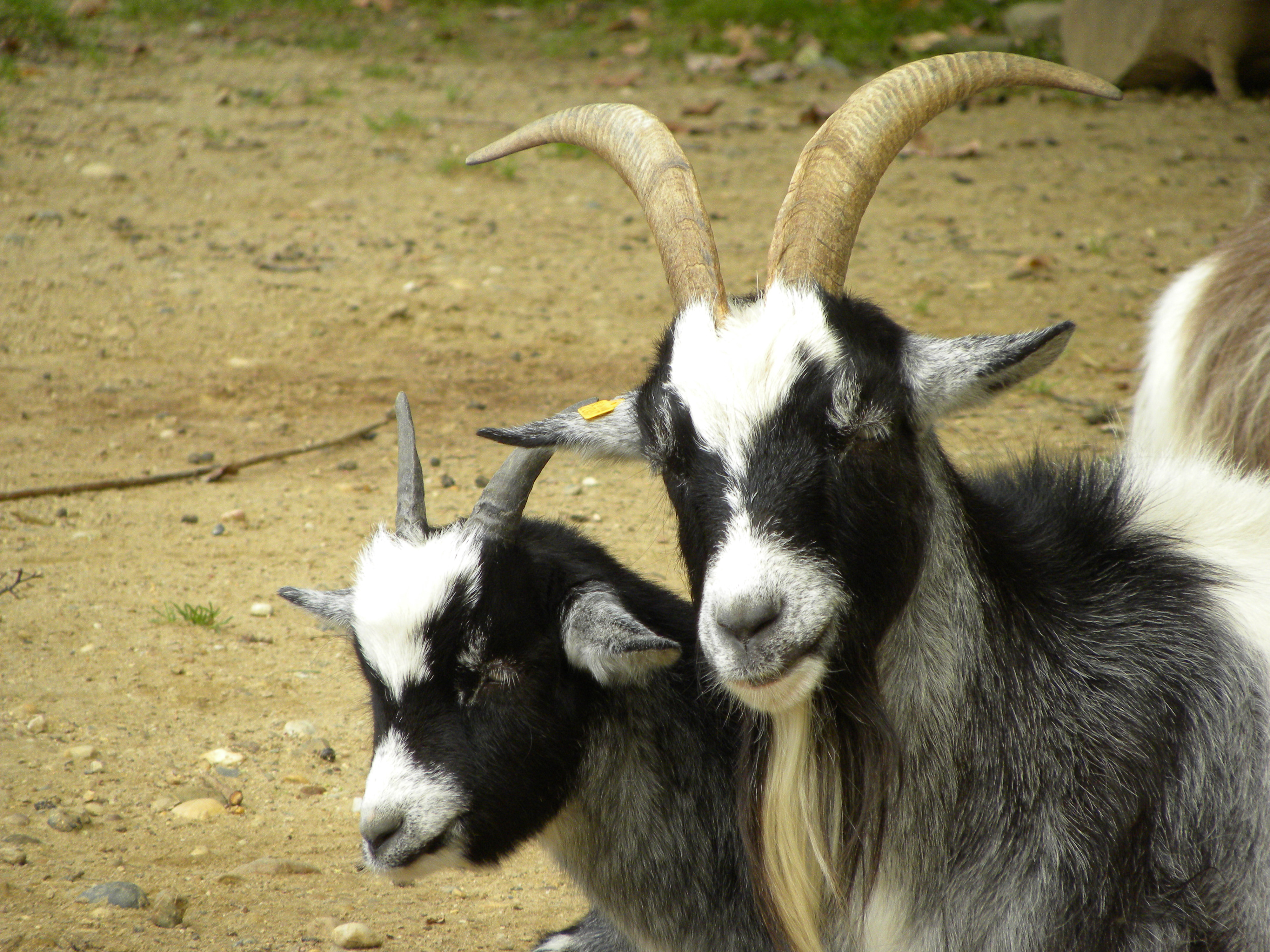 Hollandse landgeit